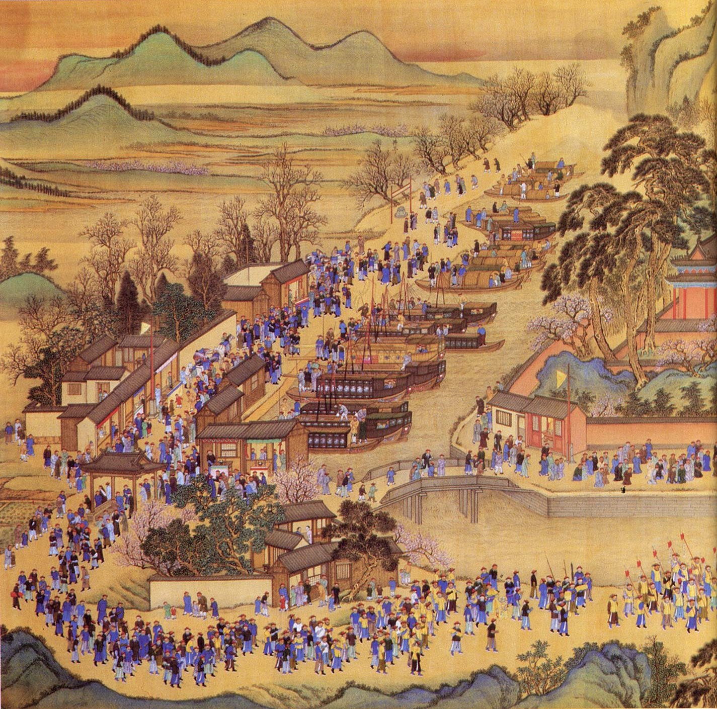 Wang Hui u. a.: Südreise des Kaisers Kangxi (Querrolle Nr. 9 - Ausschnitt: vor dem Tempel Yus des Großen), ca. 1691–98, Tusche und Farbe auf Seide, Peking